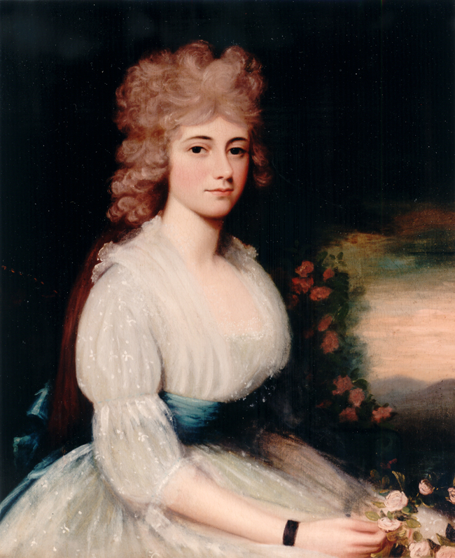 エドワード・サベージ作1794年。アメリカ合衆国6代大統領ジョン・クインシー・アダムズの夫人ルイーザの肖像画。